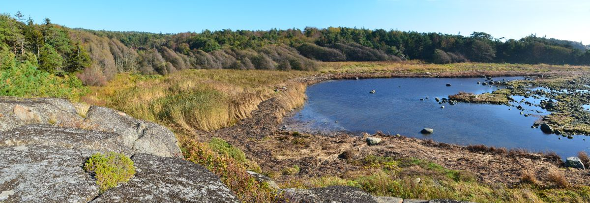 Ringane naturreservat ligger rundt en bukt på Søndre Eftang.